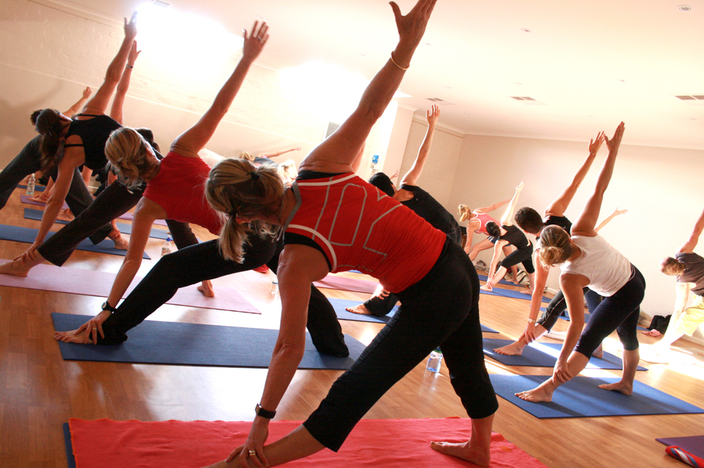 Yoga Class at a Gym